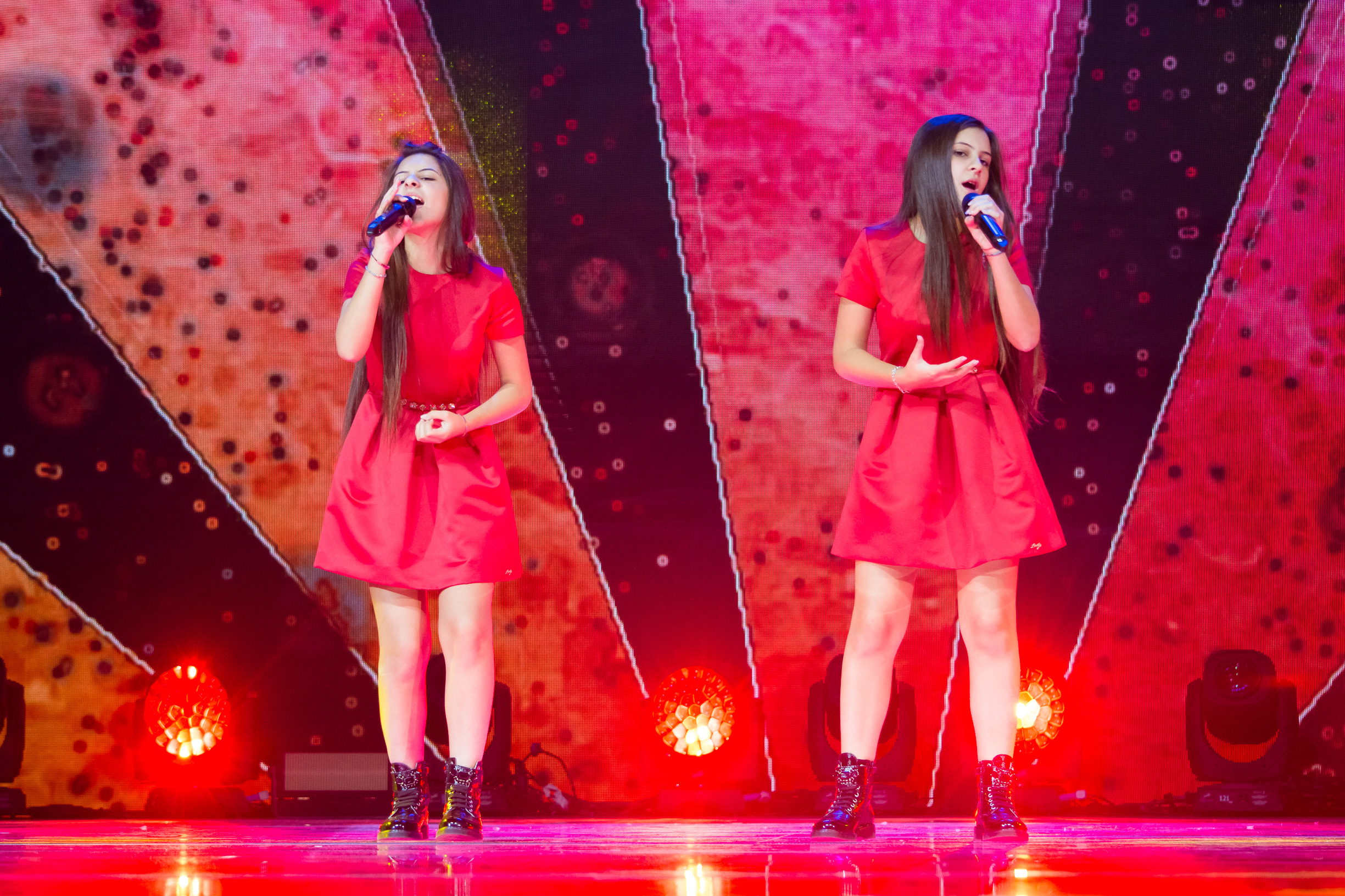 Кьяра и Мартина Скарпари на сцене Детского Евровидения 2015 («Армеец», София) во время генеральной репетиции